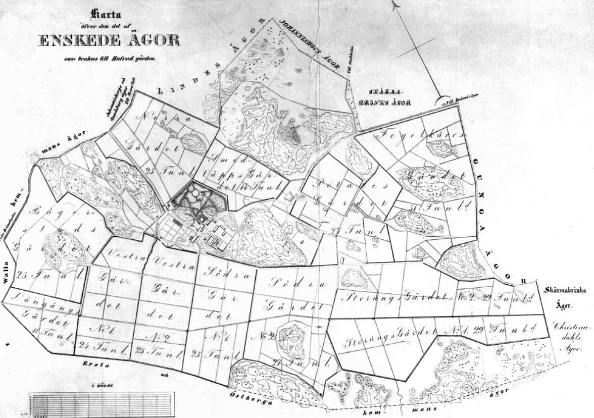 Karta över den del av Enskede ägor som brukades av huvudgården, upprättad 1843